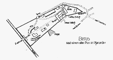 alter Plan von Berus